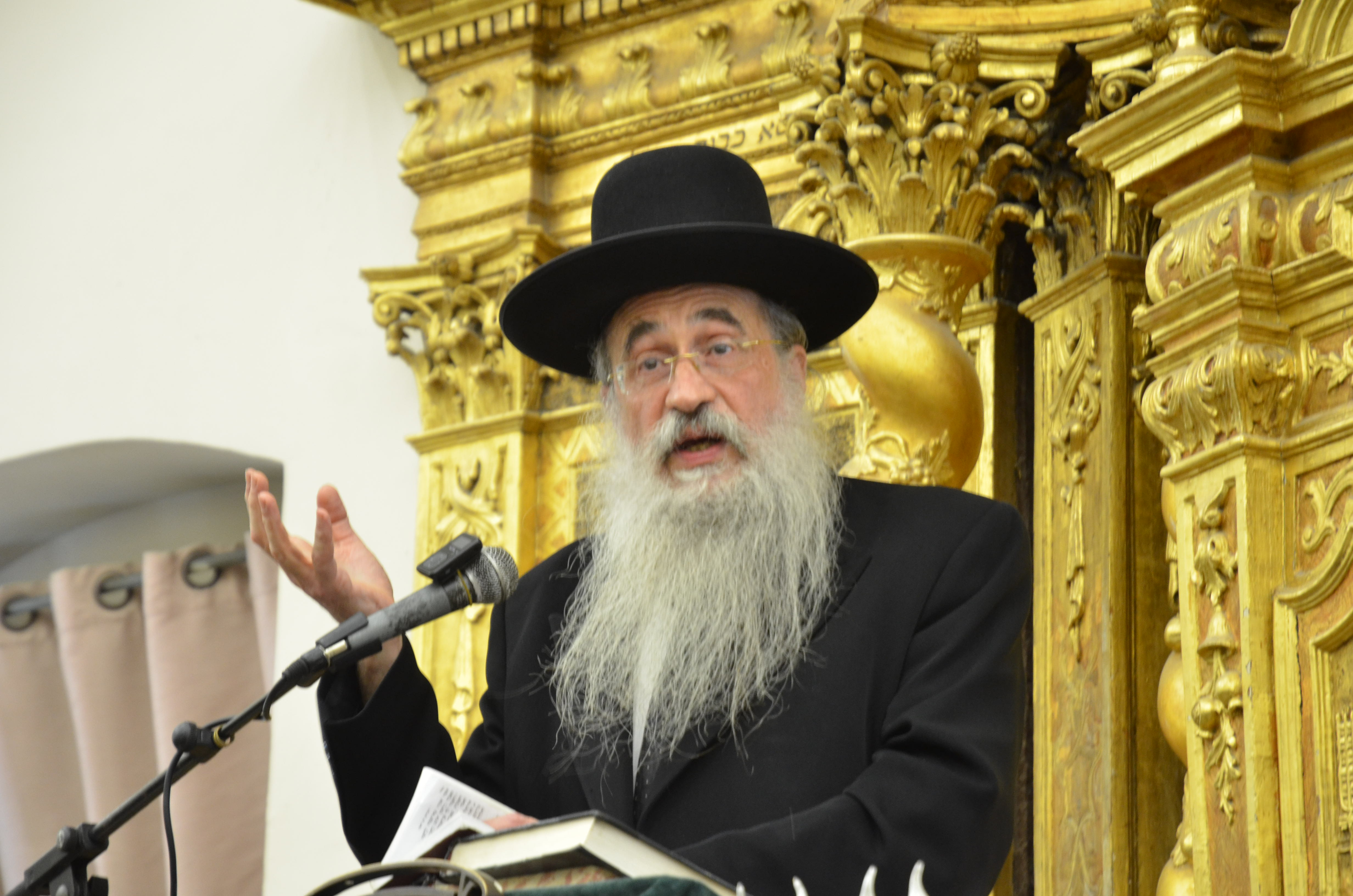 הרב דסלר בשיחה בהיכל ישיבת פוניבז' בבני ברק